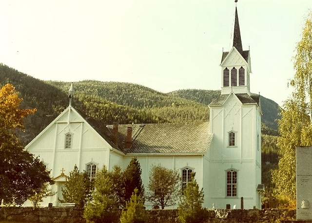 Nes kirke